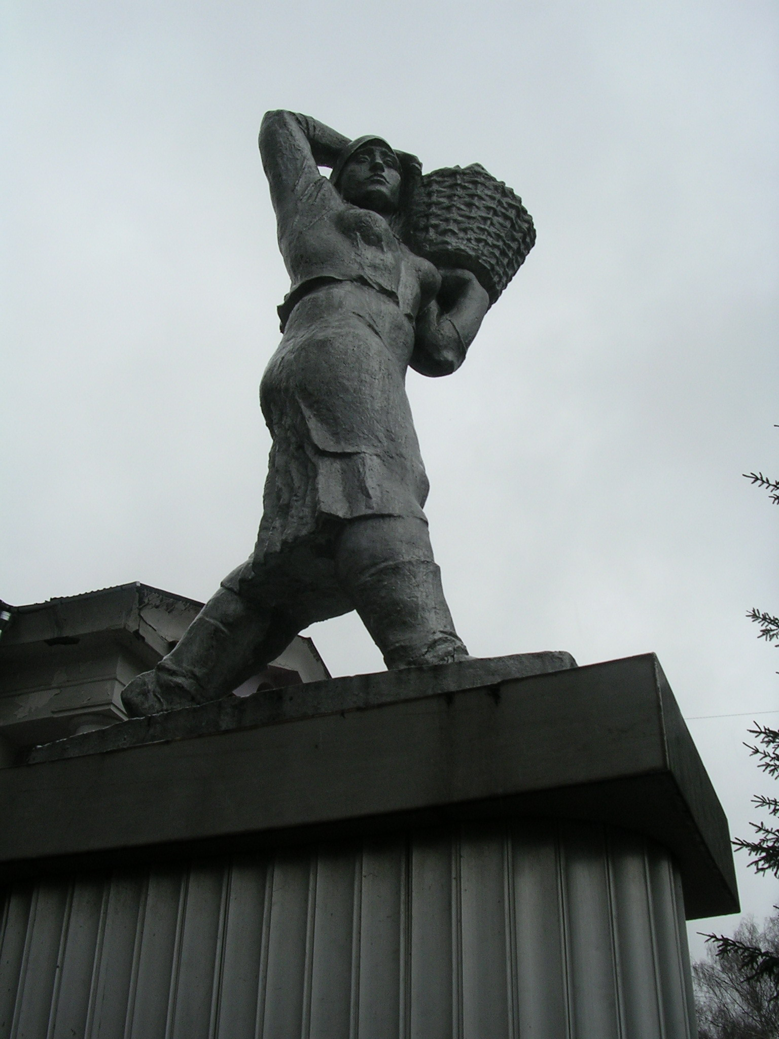 Fruity Girl Sculpture